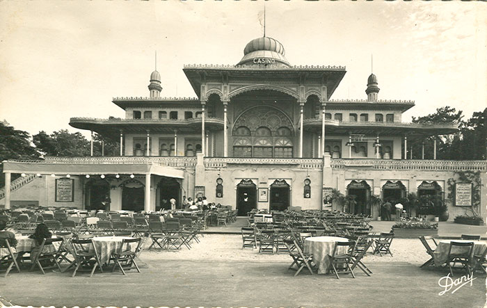 Casino Mauresque d'Arcachon (Gironde, Aquitaine, France)